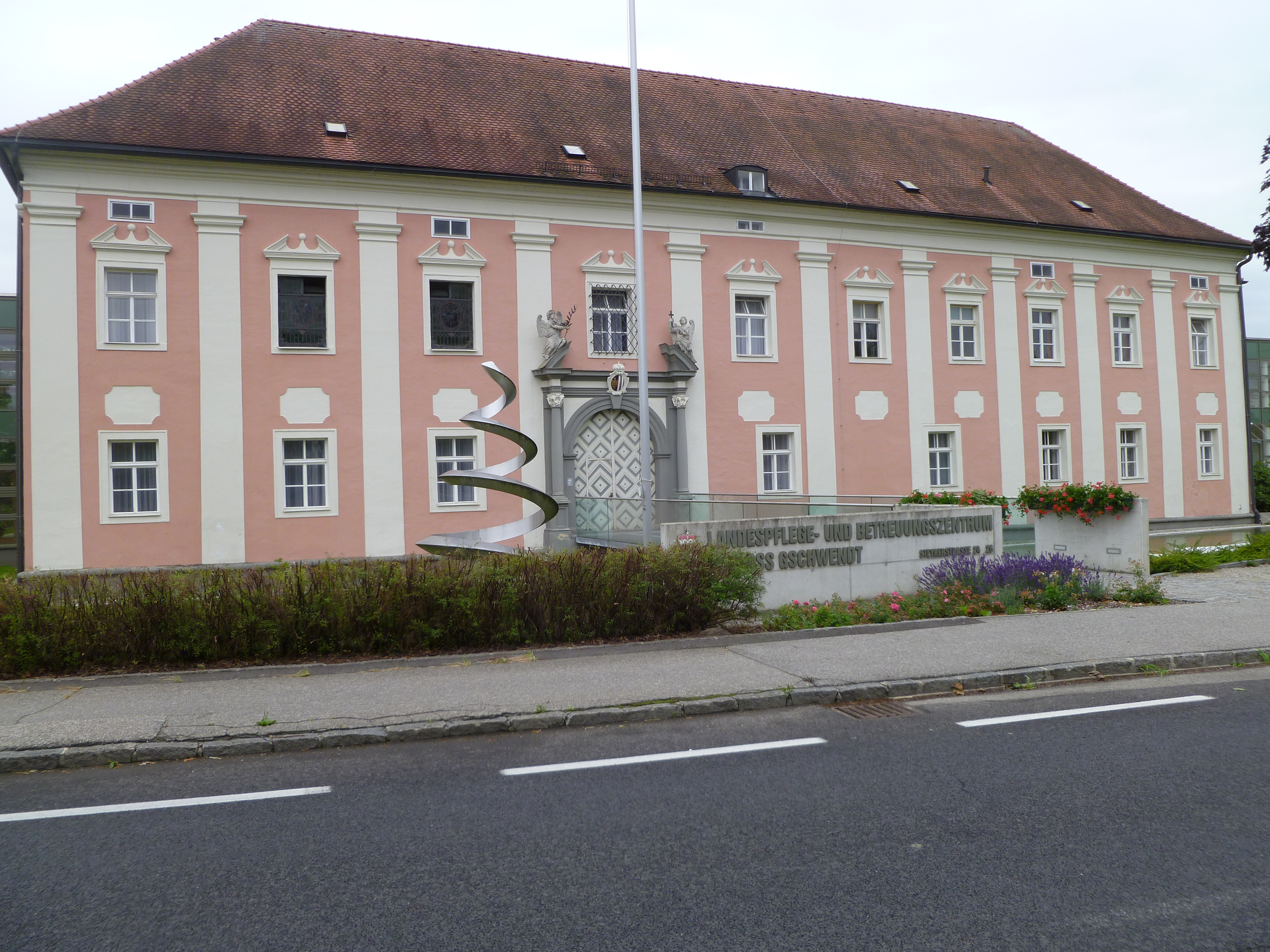 Schloss Gschwendt 2011